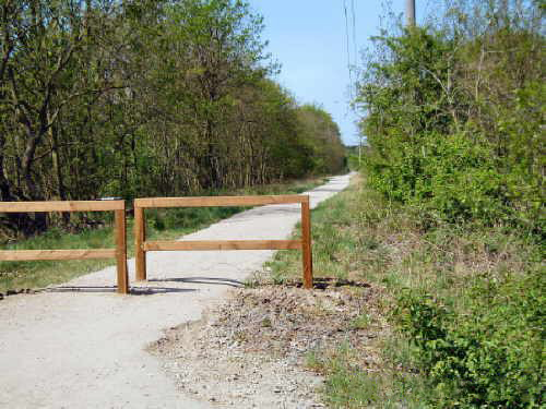 Radweg Voegelsen Mechtersen